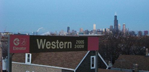 Photo de Western